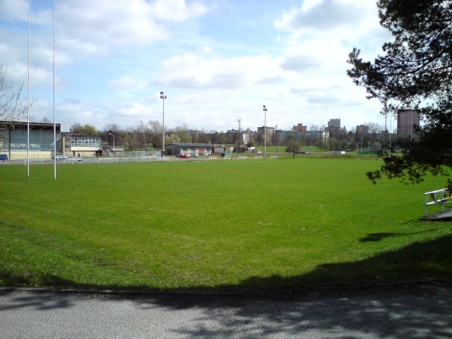 Hřiště na ragby týmu RC Havířov.